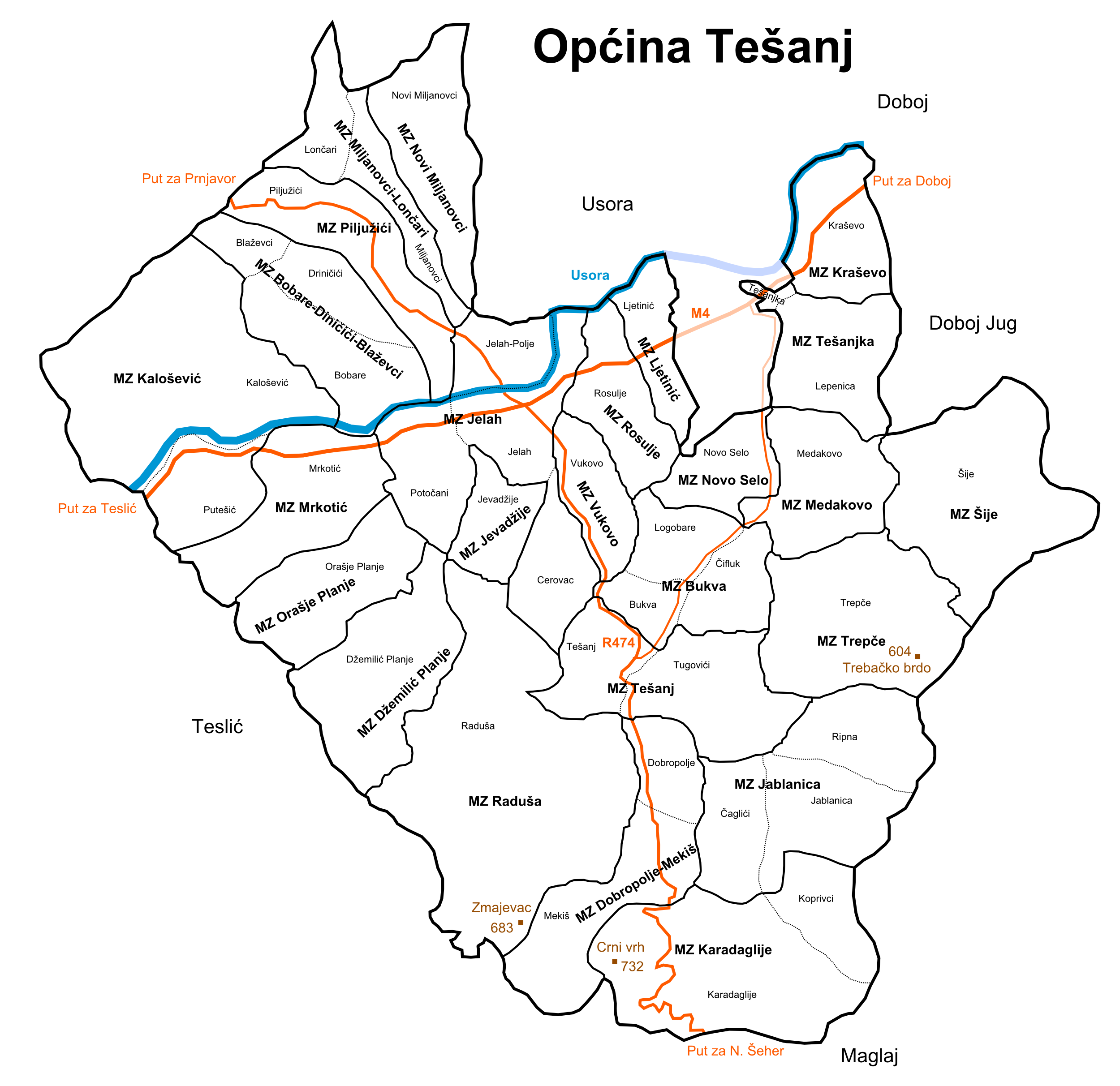 Administrative Einteilung der Općina (Großgemeinde) Tešanj.